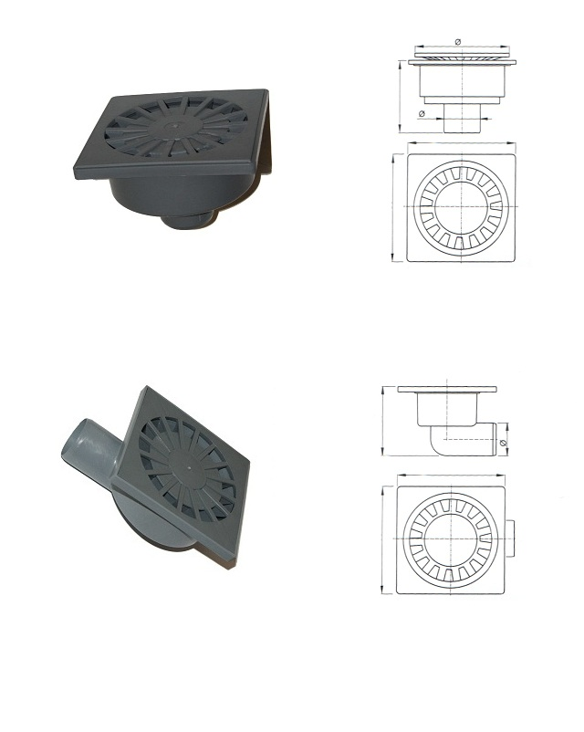 Трап для слива воды.